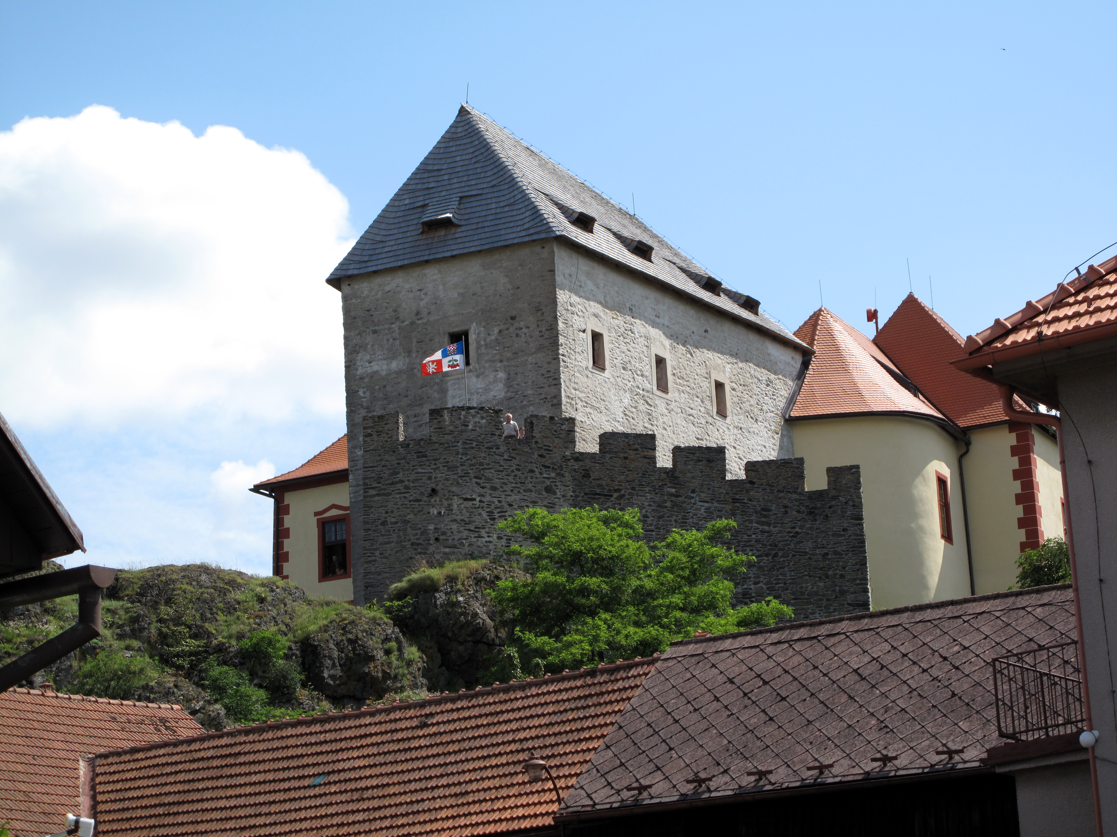 Hrad Kámen od hlavní silnice